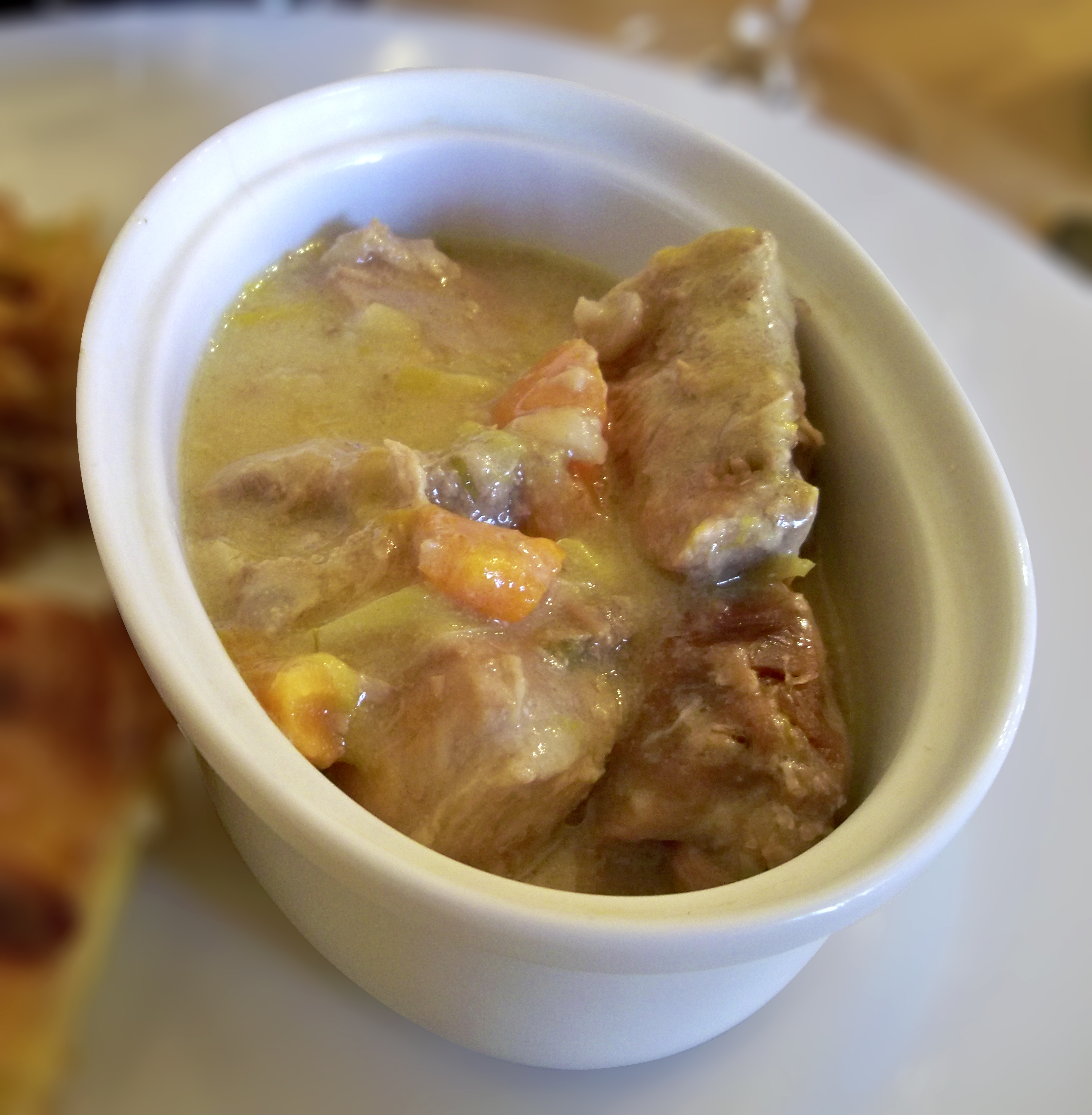 Blanquette de veau Recadrage de l'image de Véronique PAGNIER ; retouche ; colorimétrie ; création de flou pour isoler la blanquette.